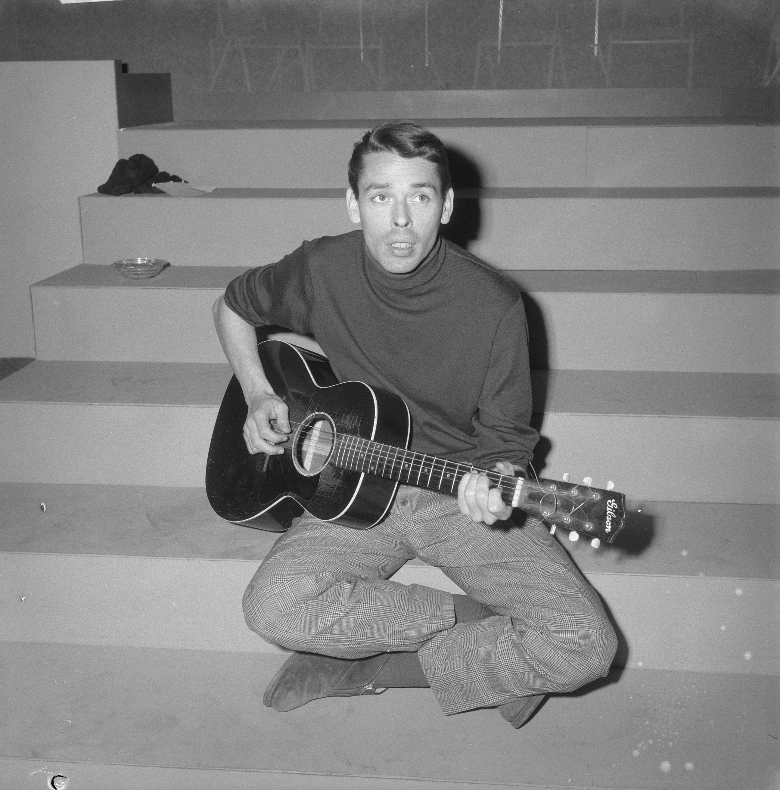 Collectie / Archief : Fotocollectie Anefo Reportage / Serie : [ onbekend ] Beschrijving : Jacques Brel in TV-programma Domino Datum : 21 maart 1962 Trefwoorden : TV-programma's, gitaren, zangers Persoonsnaam : Brel, Jacques Fotograaf : Nijs, Jac. de / Anefo Auteursrechthebbende : Nationaal Archief Materiaalsoort : Negatief (zwart/wit) Nummer archiefinventaris : bekijk toegang 2.24.01.03 Bestanddeelnummer : 913-6745